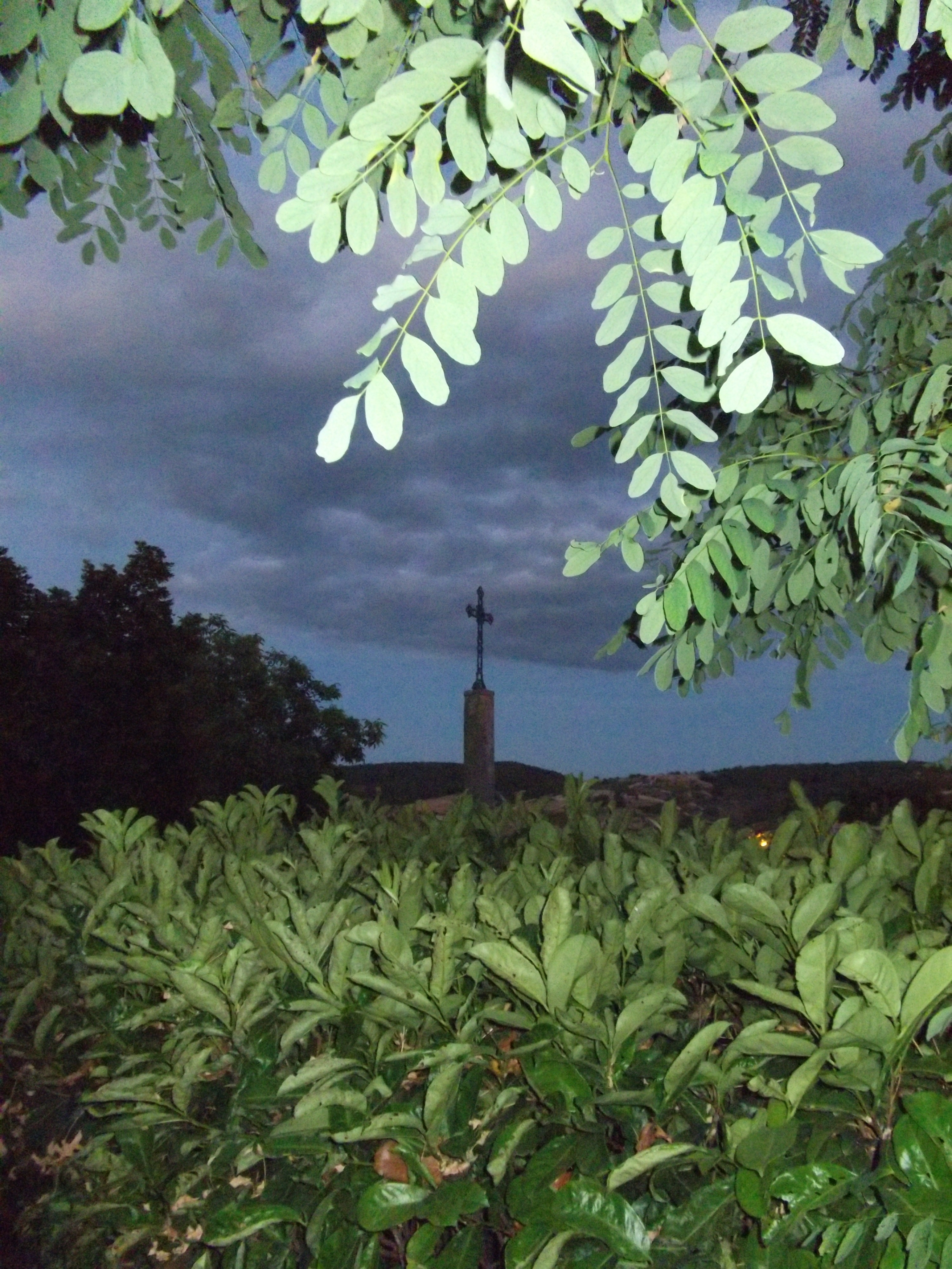 Croix des Pourrettes, à la tombée de la nuit (Saint-Andéol-de-Berg / Ardèche - France)